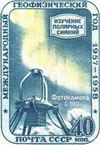 Марка выпущенная в честь Международного геофизического года - года образования полигона МГГ Полярной геокосмофизической обсерватории. На ней изображена фотокамера С-180 - первое оборудование Полярной геокосмофизической обсерватории Тикси.